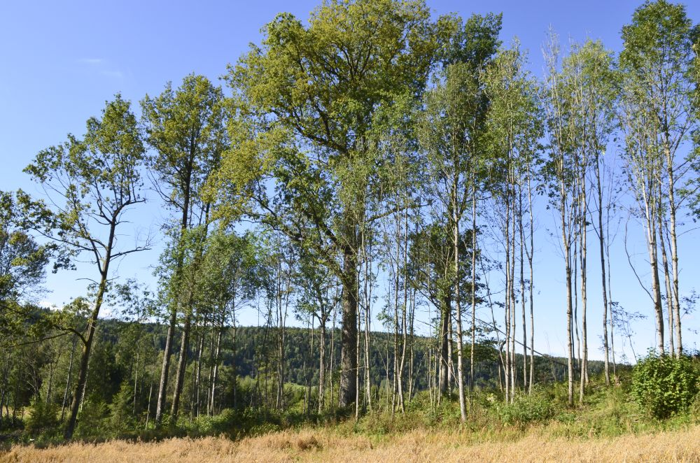 Eiketreet står i åkerkanten og er målt til 26 meters høyde.